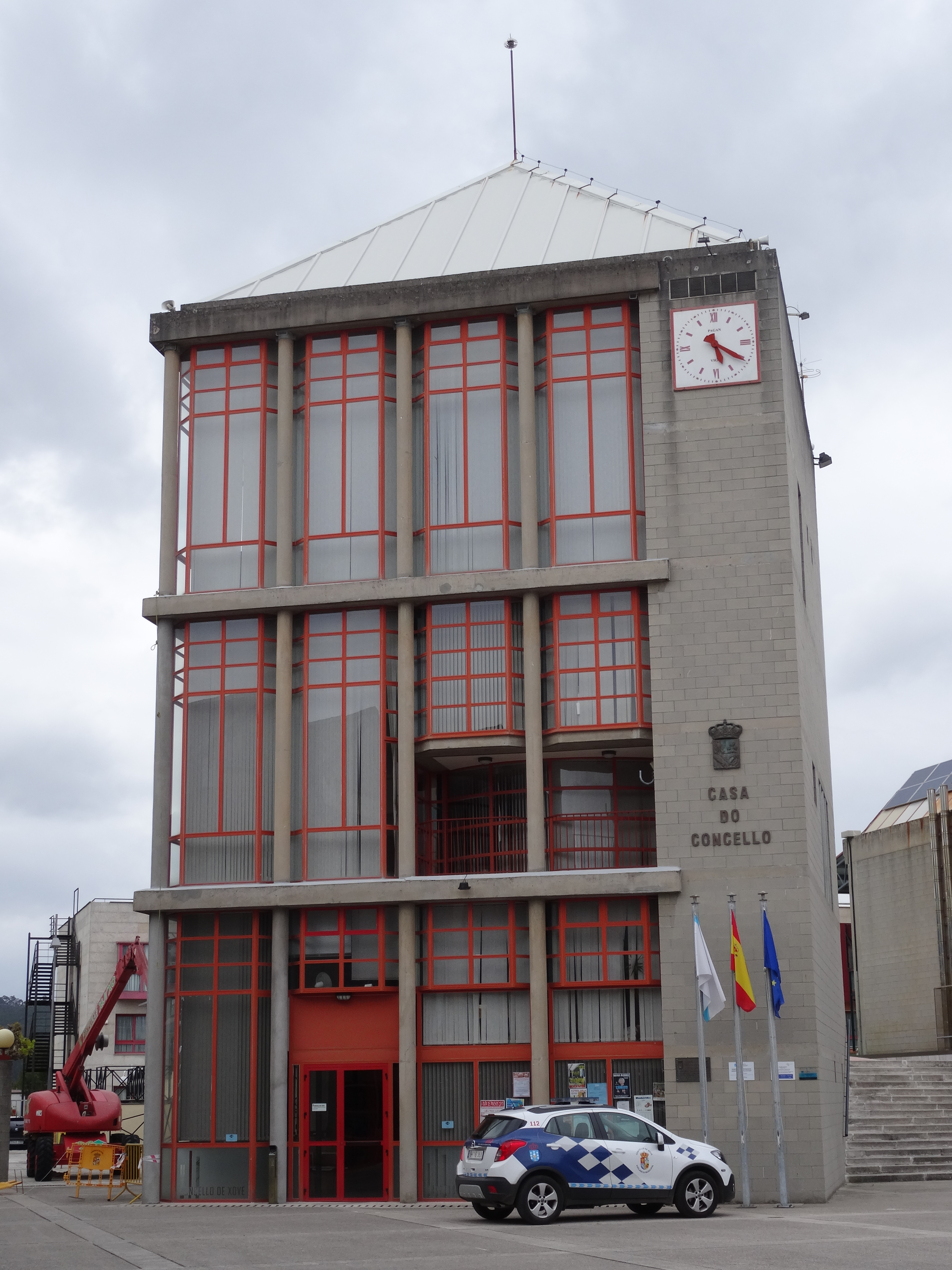 Ver título